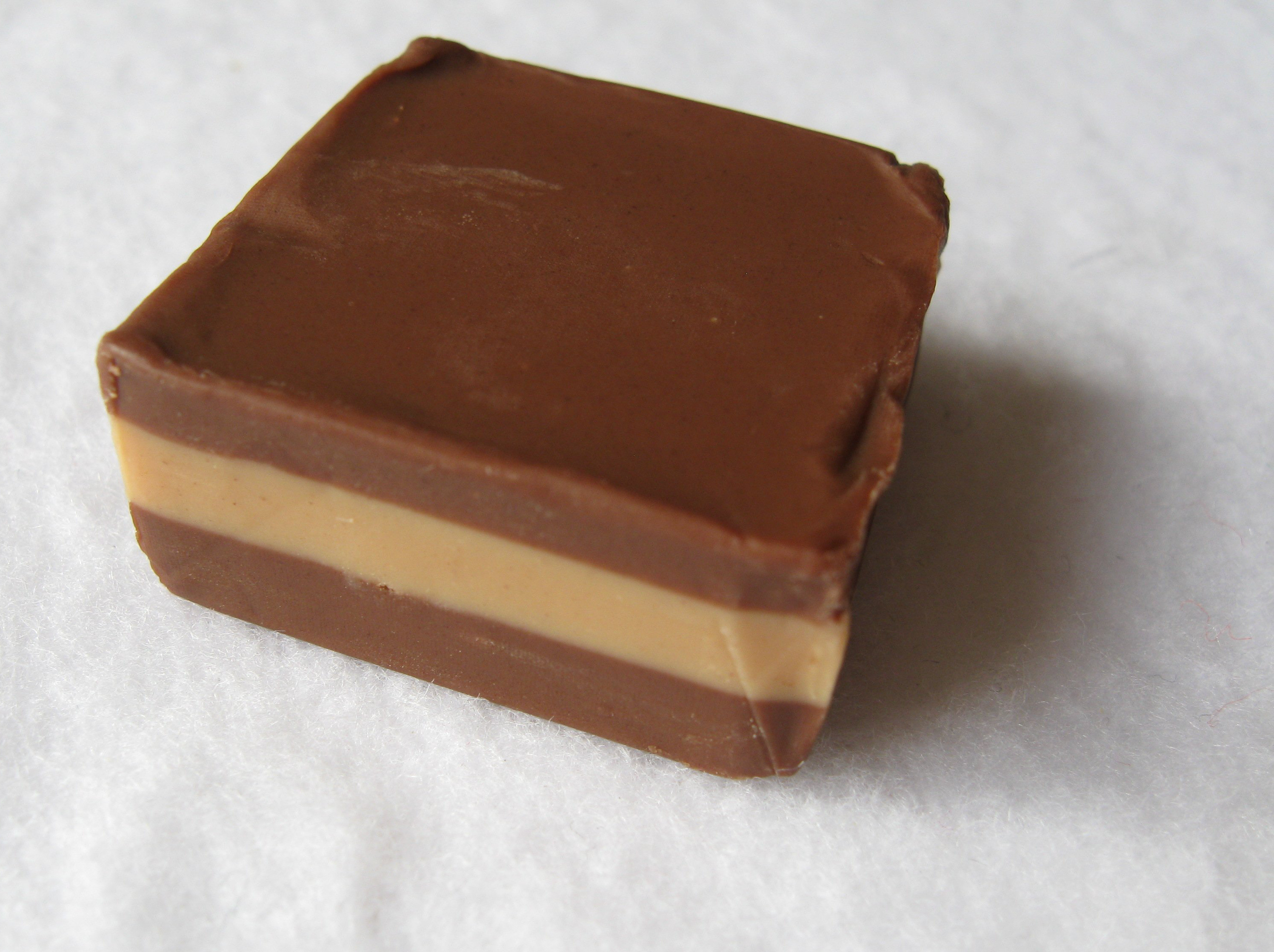 Cremino Feletti con ripieno alla nocciola